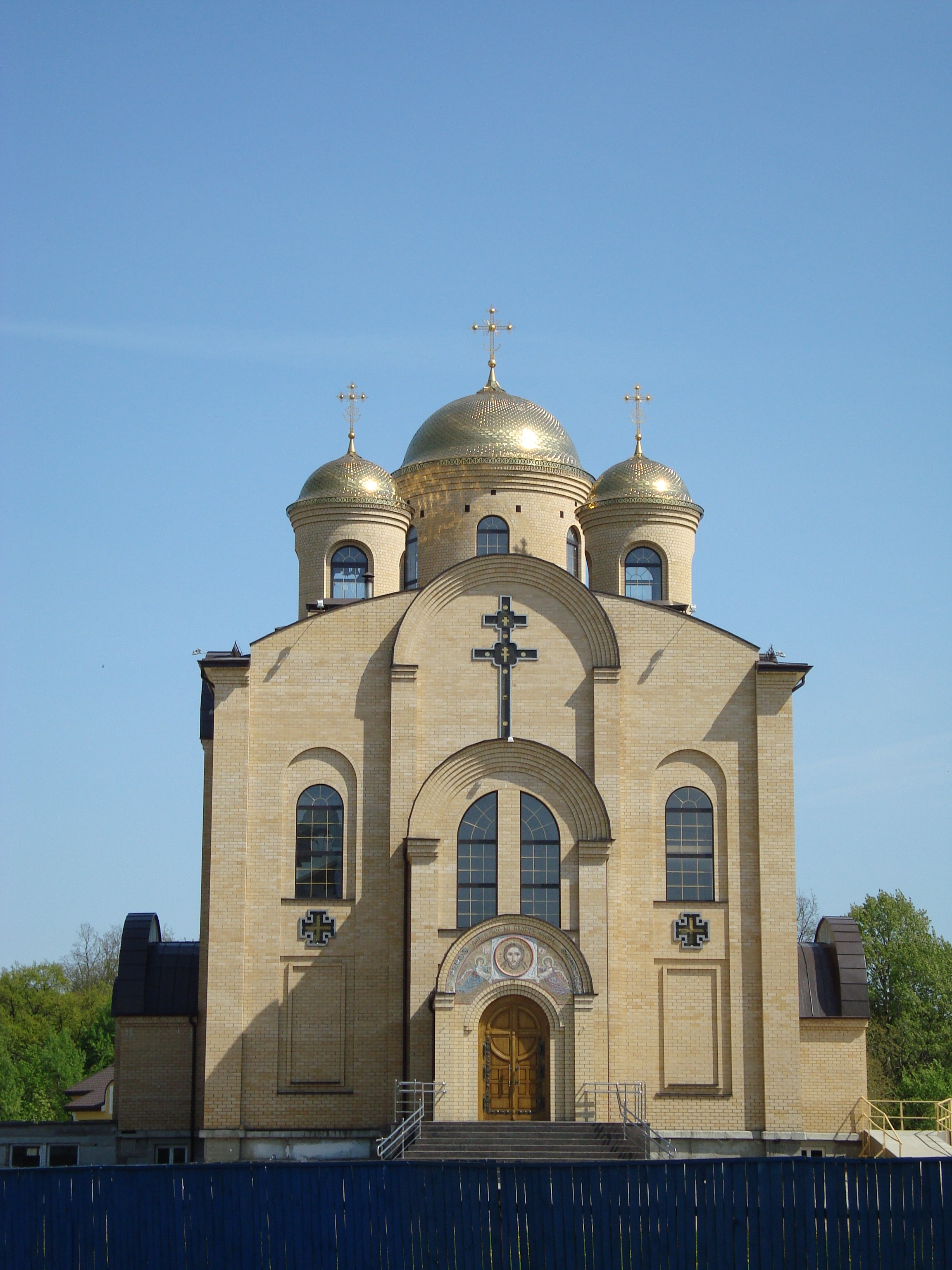 The Сhurch at the Park "Rumlevo", Grodno / Церковь у парка "Румлёво", Гродно